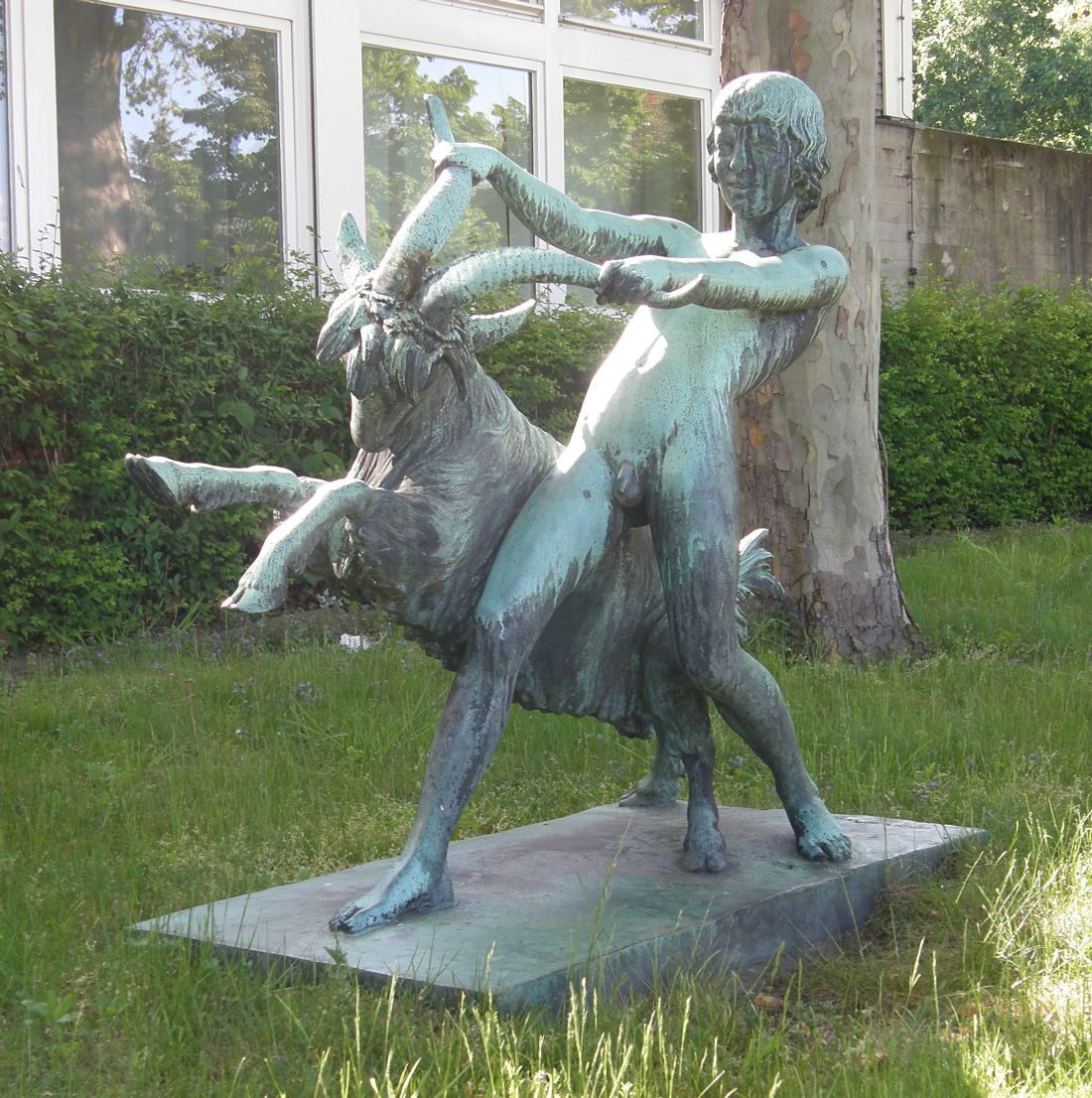 Hans Latt: Junge mit Ziegenbock. 1918, Bronze. Rudolstädter Straße 79, Berlin-Wilmersdorf.